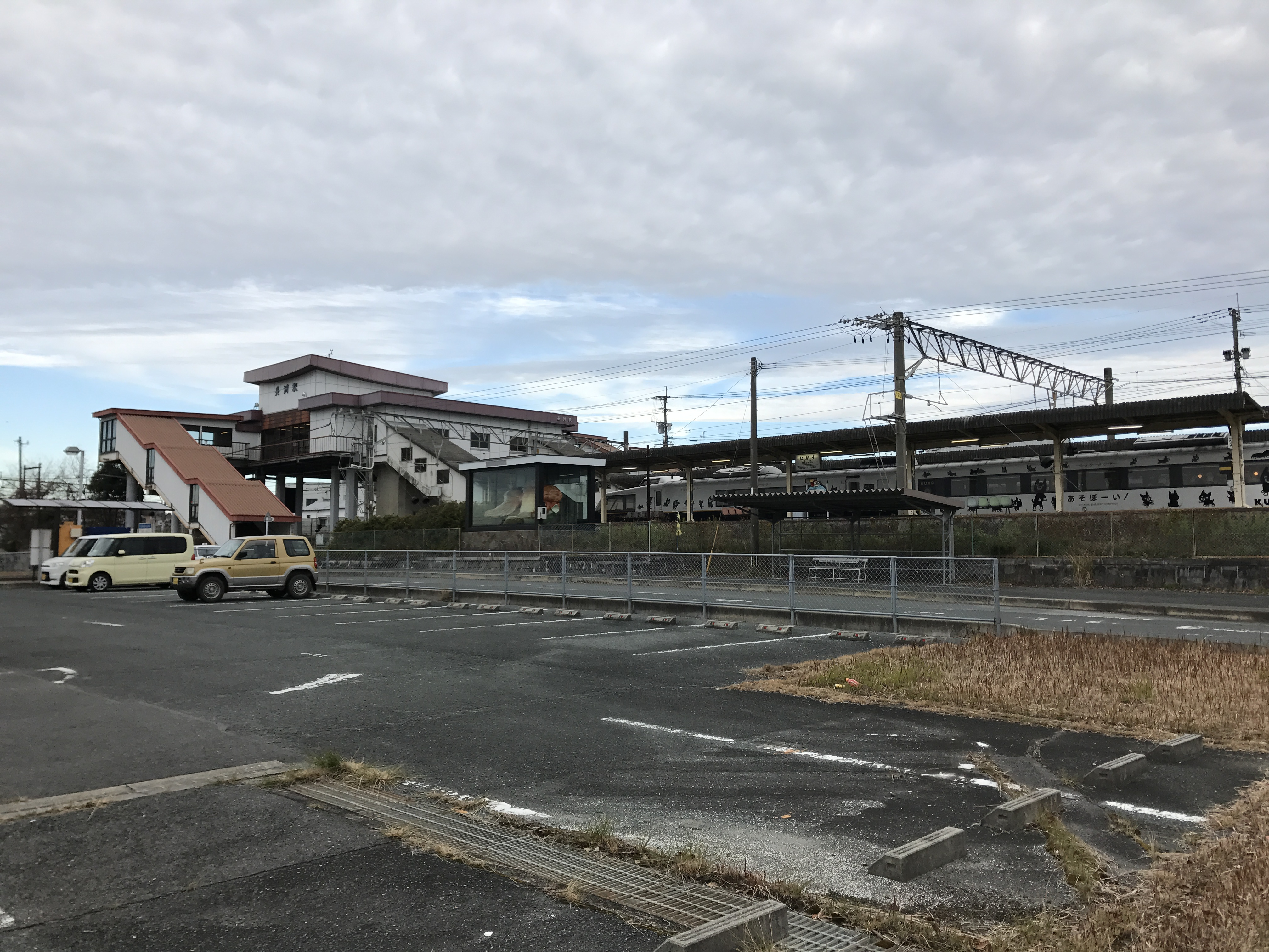 長洲駅駅舎